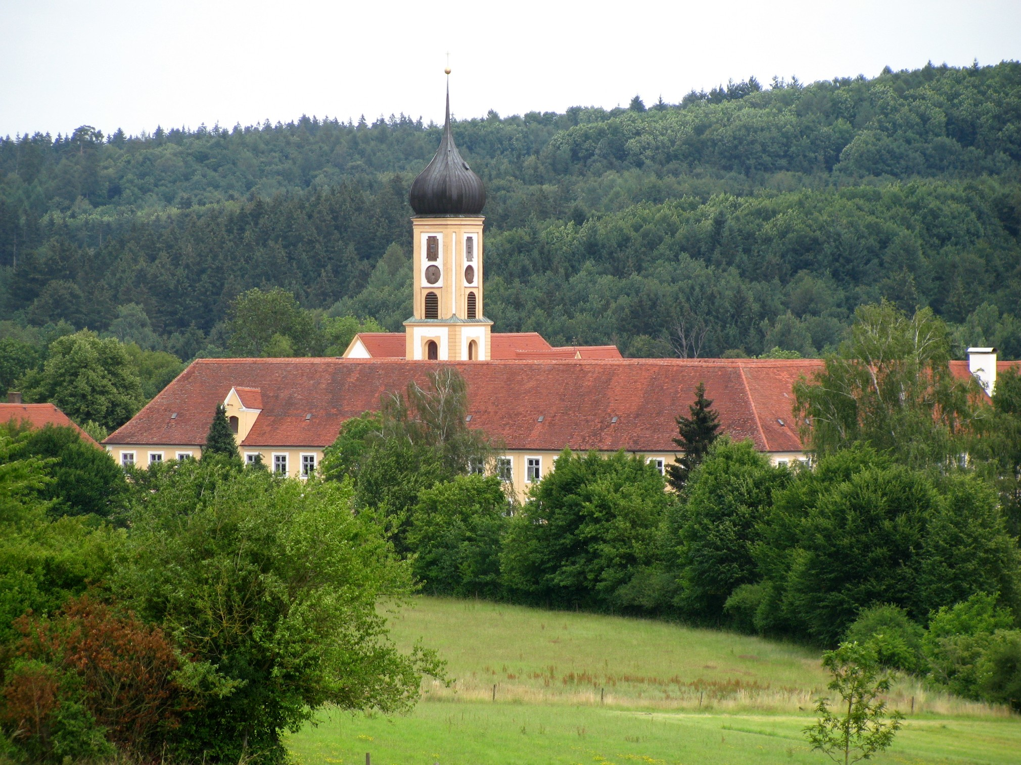 Kloster Oberschönenfeld